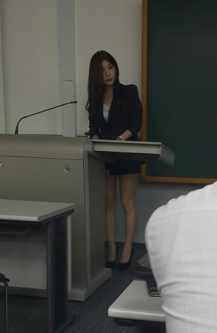 2015 유니브엑스포 부산대 강연에서 MC로 맡은 박현서